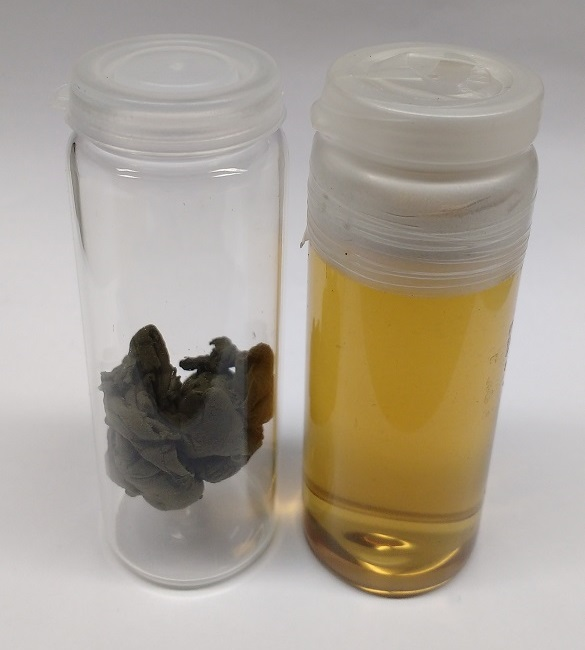 Left: 70 mg of frieeze dried suspension. Right: Aqueous dispersion with a concentration of 0.1 mg/mL graphene oxide.